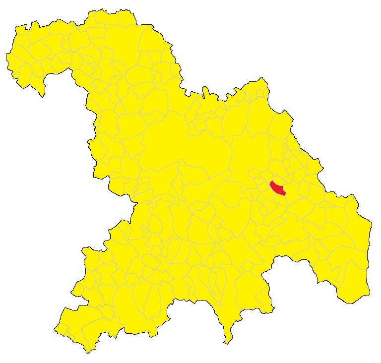 Mappa del comune di Costa Vescovato (AL)